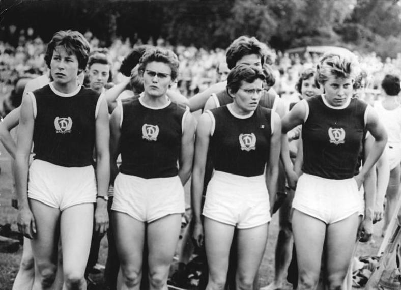 Maier, Birkemeyer, Stubick, Lehmann Zentralbild Wlocka-Wittig Deutsche Leichtathletik-Meisterschaften 1958 in Jena 18. - 20.Juli UBz: Neuen Deutschen Rekord erzielte die Frauenstaffel des SC Dynaom Berlin über 4 x 100 m mit 46,1 sek. vlnr: Maier, Birkemeyer, Stubick, Lehmann.